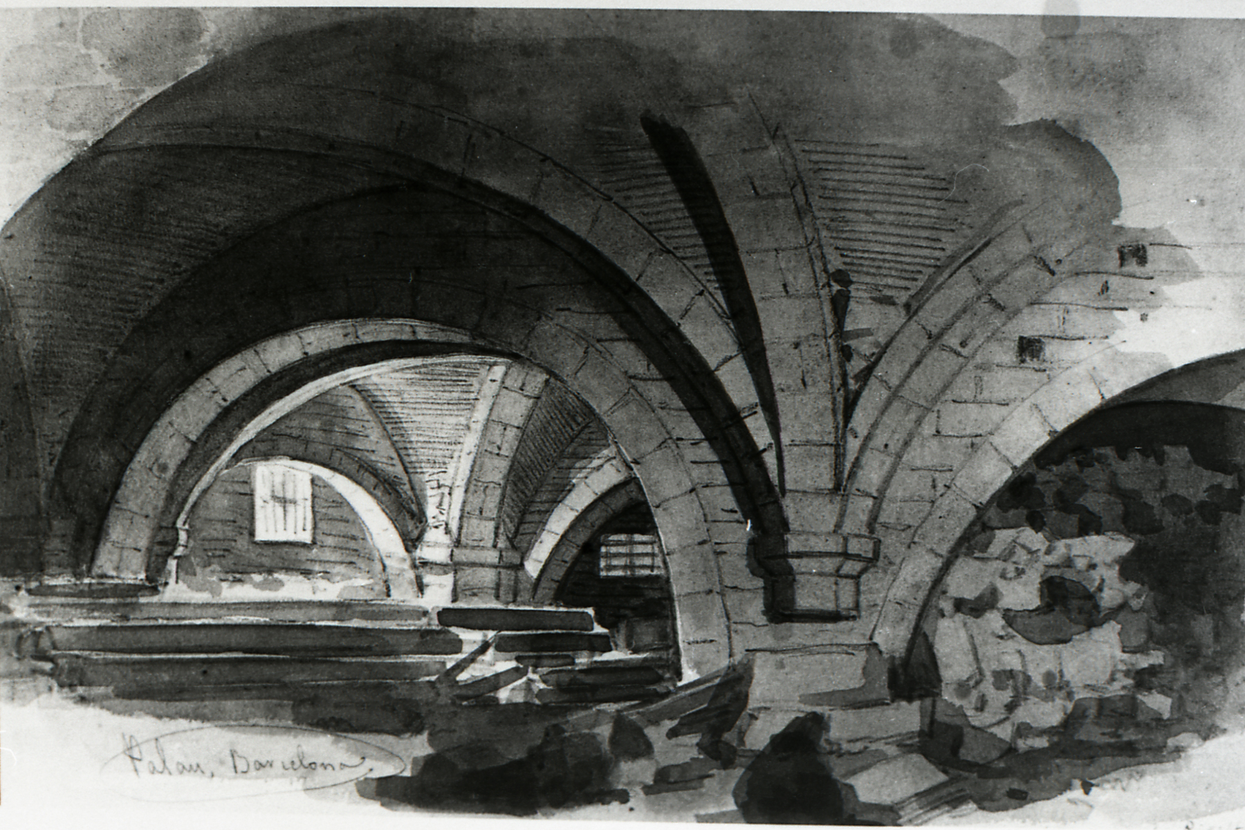 Barcelona, Palau del Temple, planta baixa de la "sala dels cavalls", realitzat per Lluís Rigalt l'any 1858. (Museu d'Història de la Ciutat).